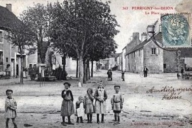 Place Saint-André de Perrigny-lès-Dijon